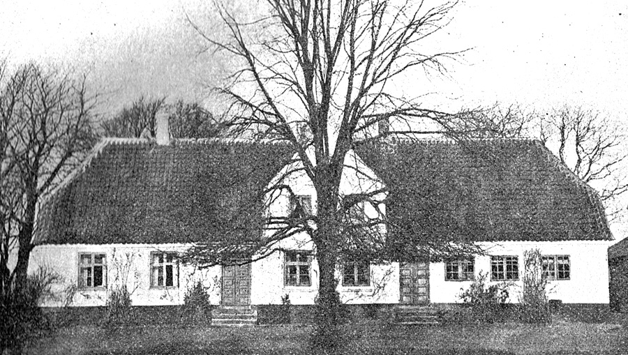 Lykkenssæde er en lille sædegård, som er dannet i 1793 af greve Joh. Ludv. Reventlow til Brahetrolleborg Gods. Gården ligger i Hillerslev Sogn, Sallinge Herred, Ringe Kommune.